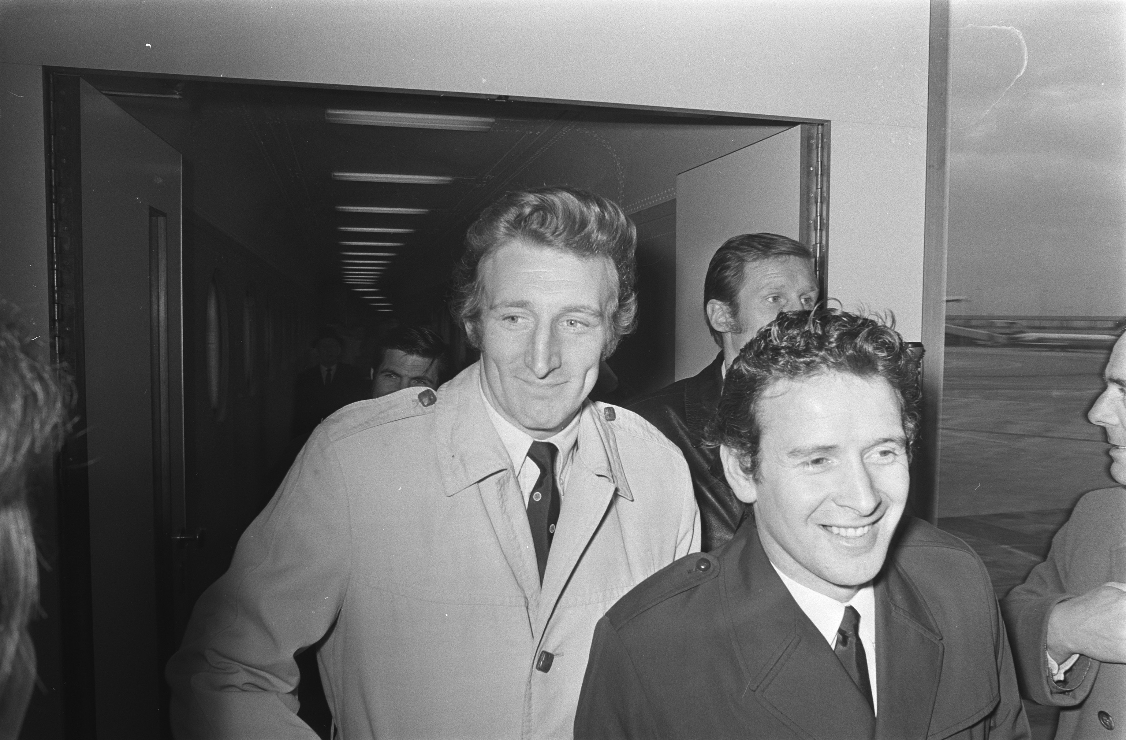 Collectie / Archief : Fotocollectie Anefo Reportage / Serie : Aankomst van het voetbalelftal van Celtic uit Glasgow, Schotland op Schiphol Beschrijving : Spelers Tommy Gemmell (l) en Willie Wallace Datum : 9 maart 1971 Locatie : Noord-Holland, Schiphol Trefwoorden : portretten, spelers, sport, vliegvelden, voetbal Persoonsnaam : Gemmell, Tommy, Wallace, Willie Fotograaf : Joost Evers / Anefo Auteursrechthebbende : Nationaal Archief Materiaalsoort : Negatief (zwart/wit) Nummer archiefinventaris : bekijk toegang 2.24.01.05 Bestanddeelnummer : 924-3383